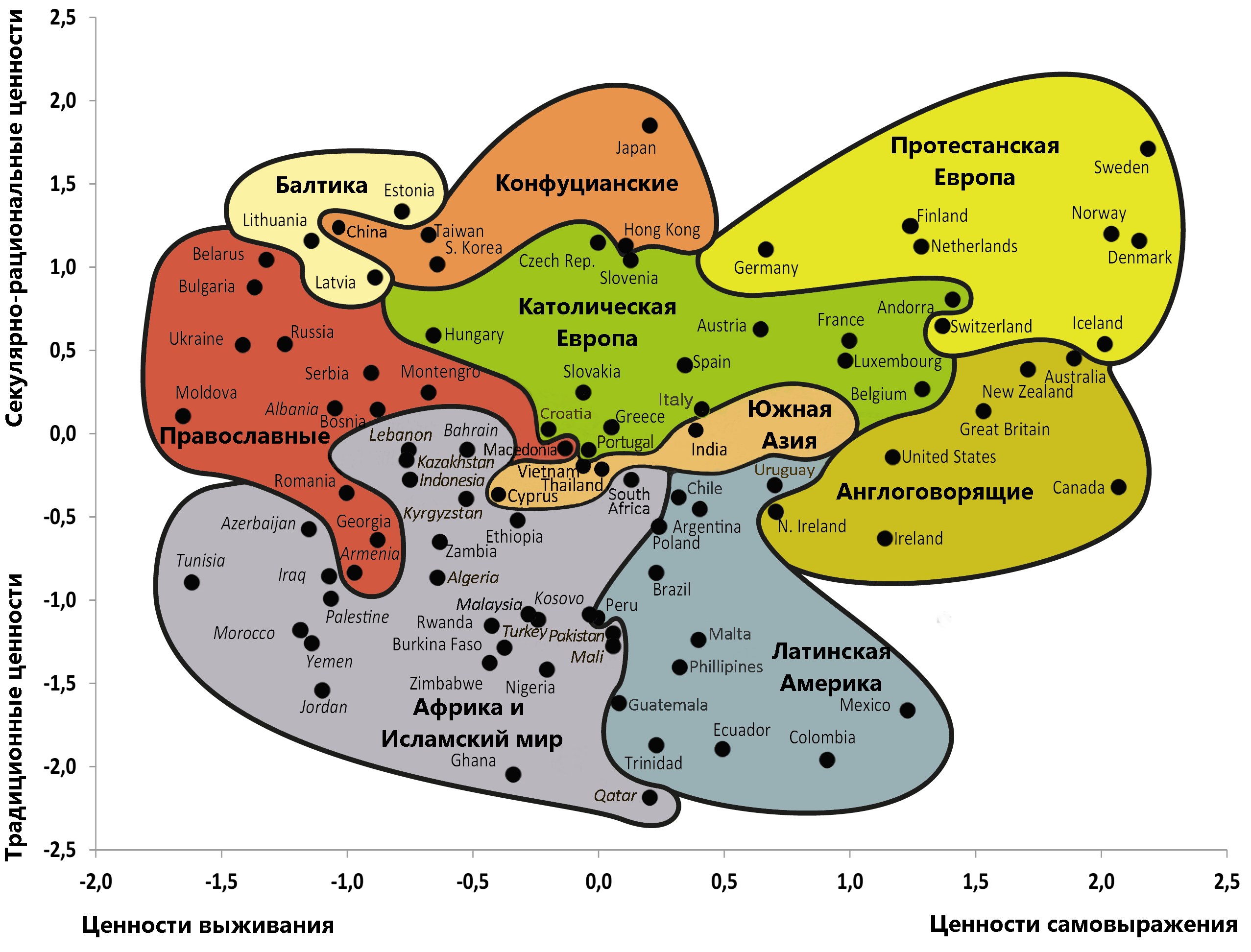 производная от